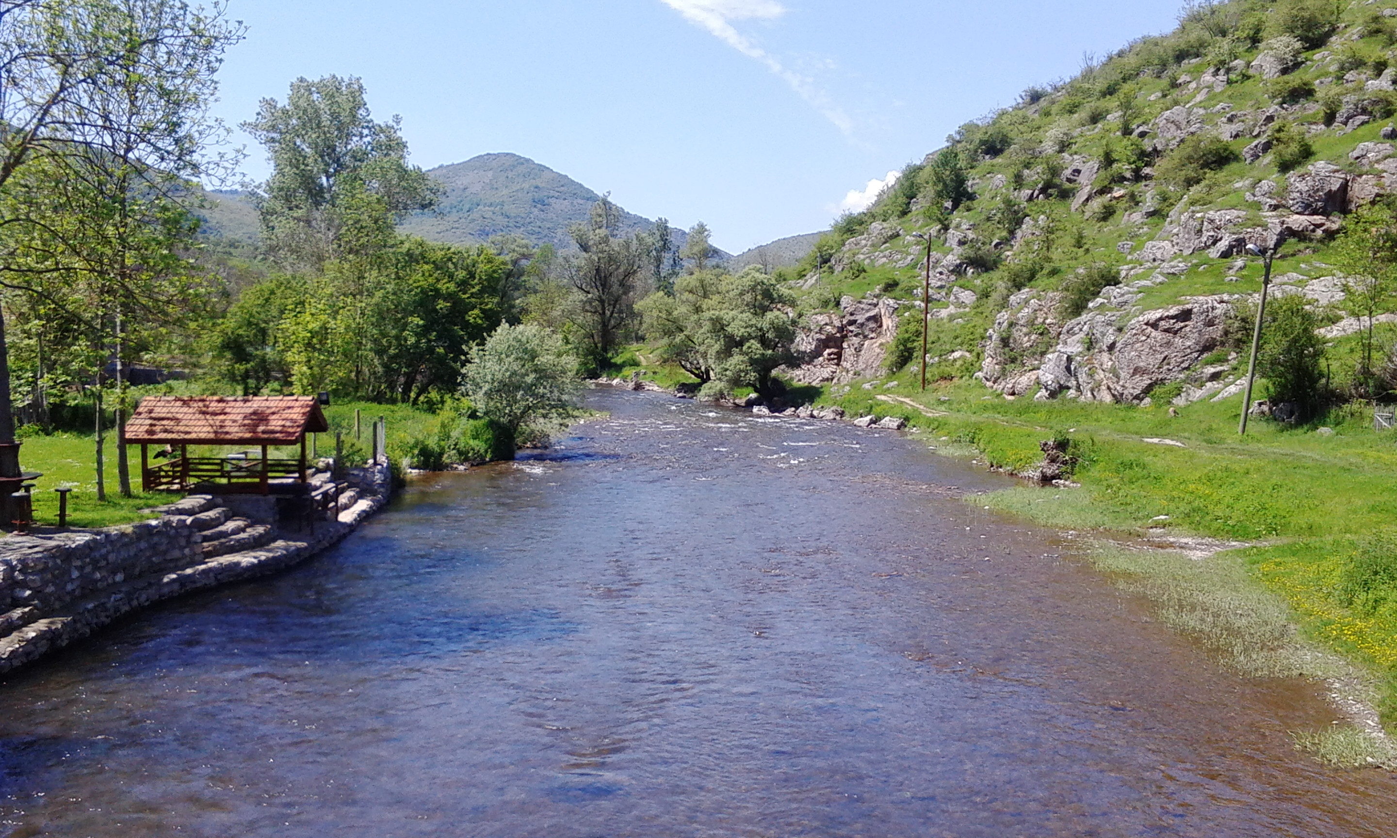 Ово је фотографија заштићеног природног добра у Србији под шифром: ПП16This is a a photo of a natural area in Serbia with ID: ПП16 Selo Rsovci, reka Visočica, opština Pirot, Park prirode Stara planina